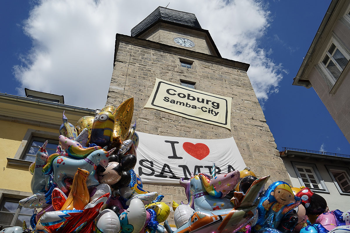 Flair am Spitaltor während des Samba-Festivals